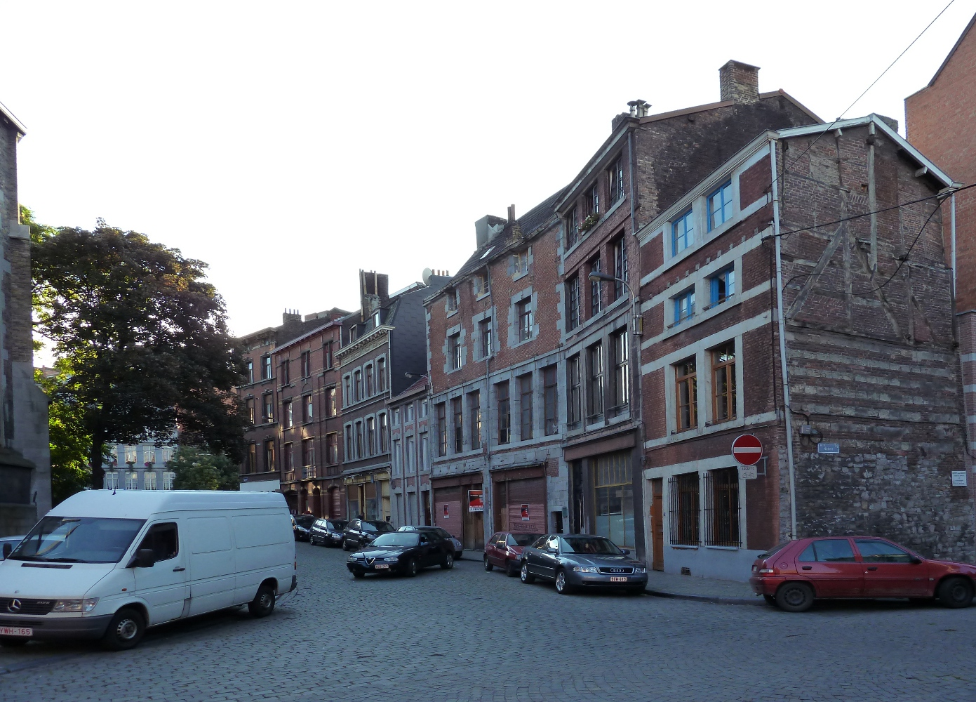 Lüttich-Outremeuse: In der Heimat von Georges Simenon